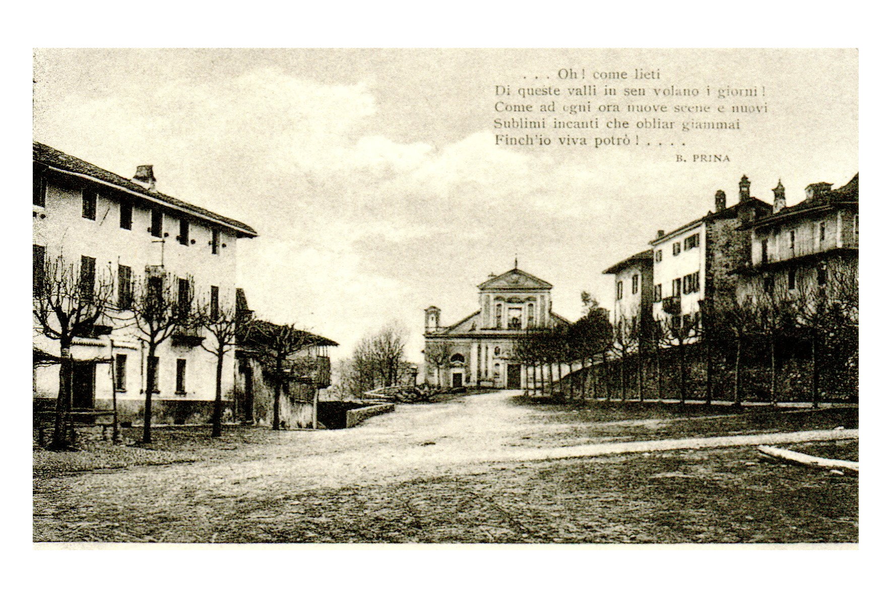 Barbania - La piazza della chiesa nel 1903